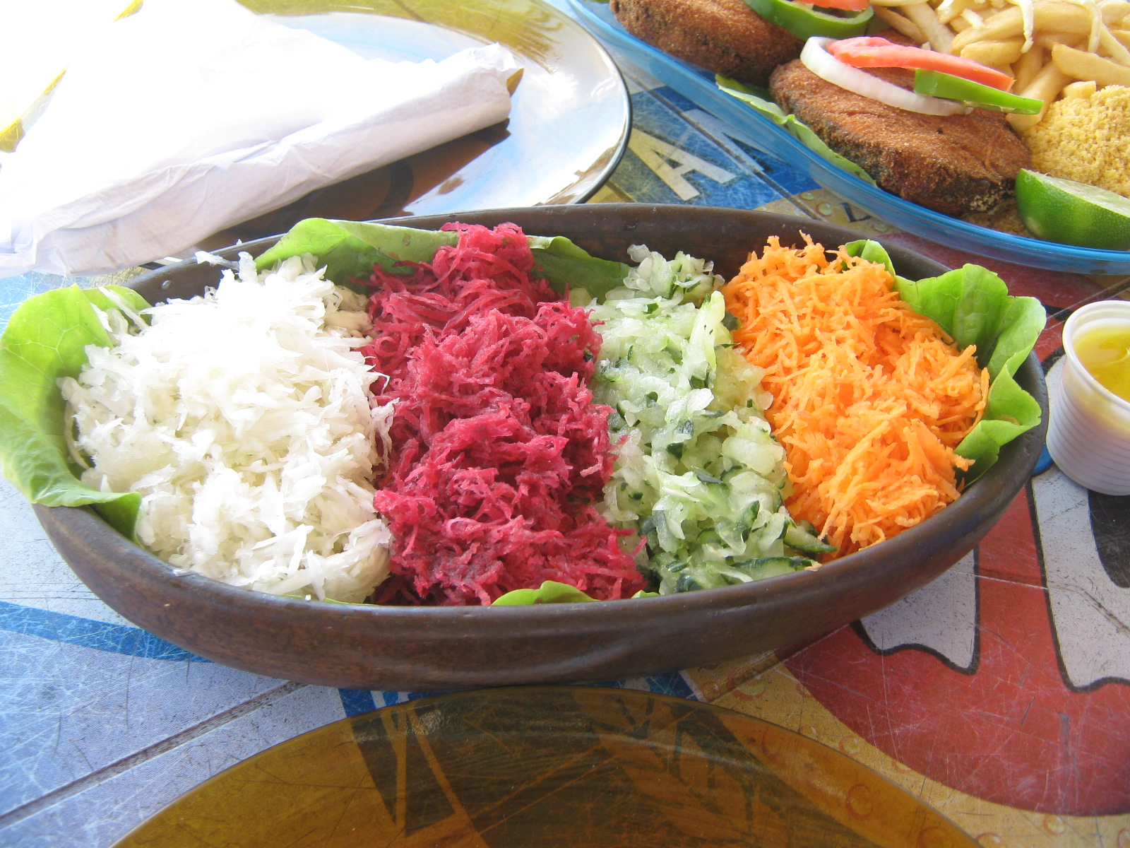 Saladinha à beira-mar